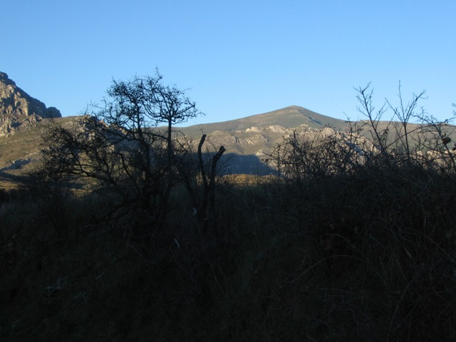 Imagen propia con licencia